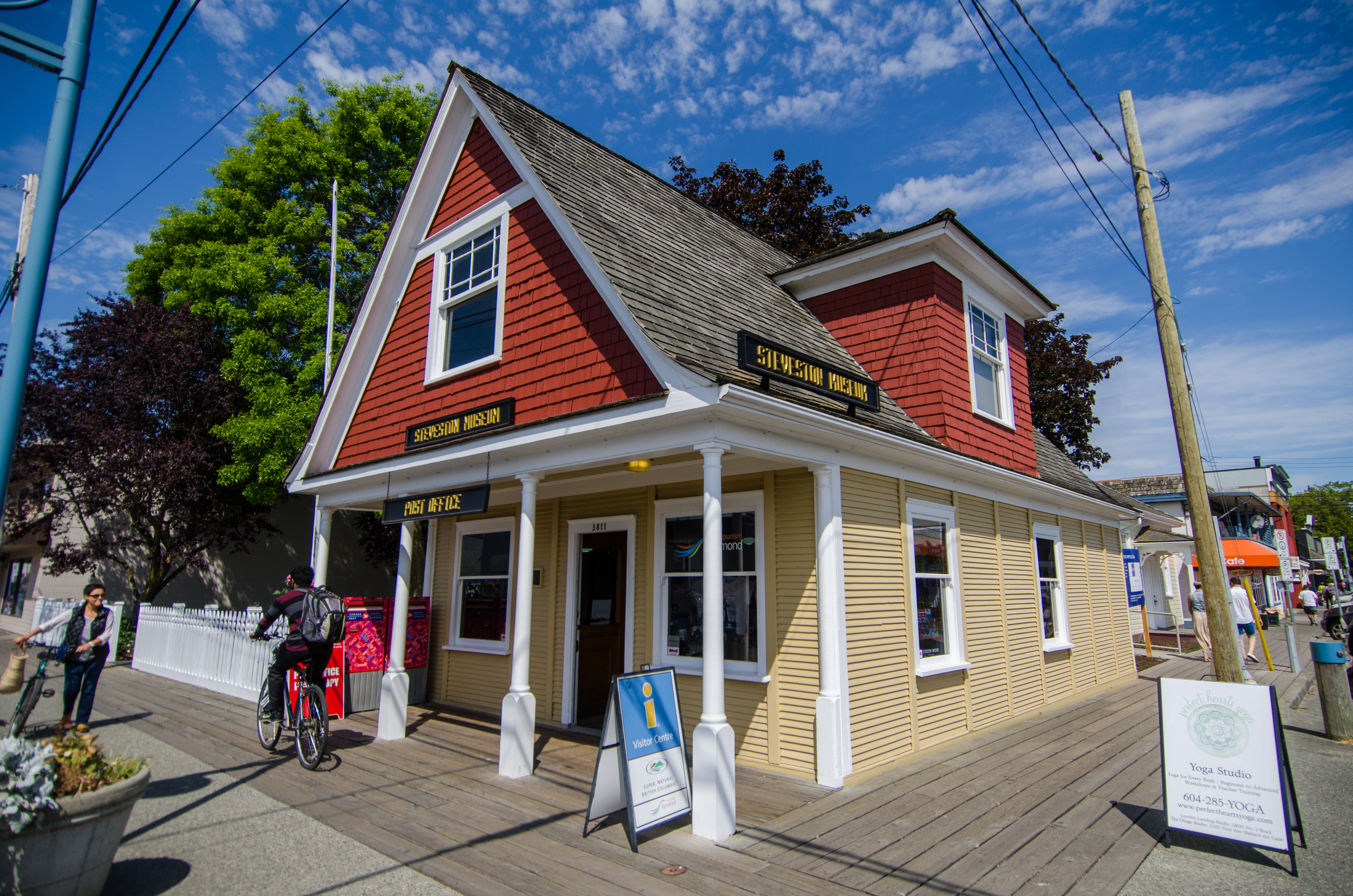 Steveston Museum